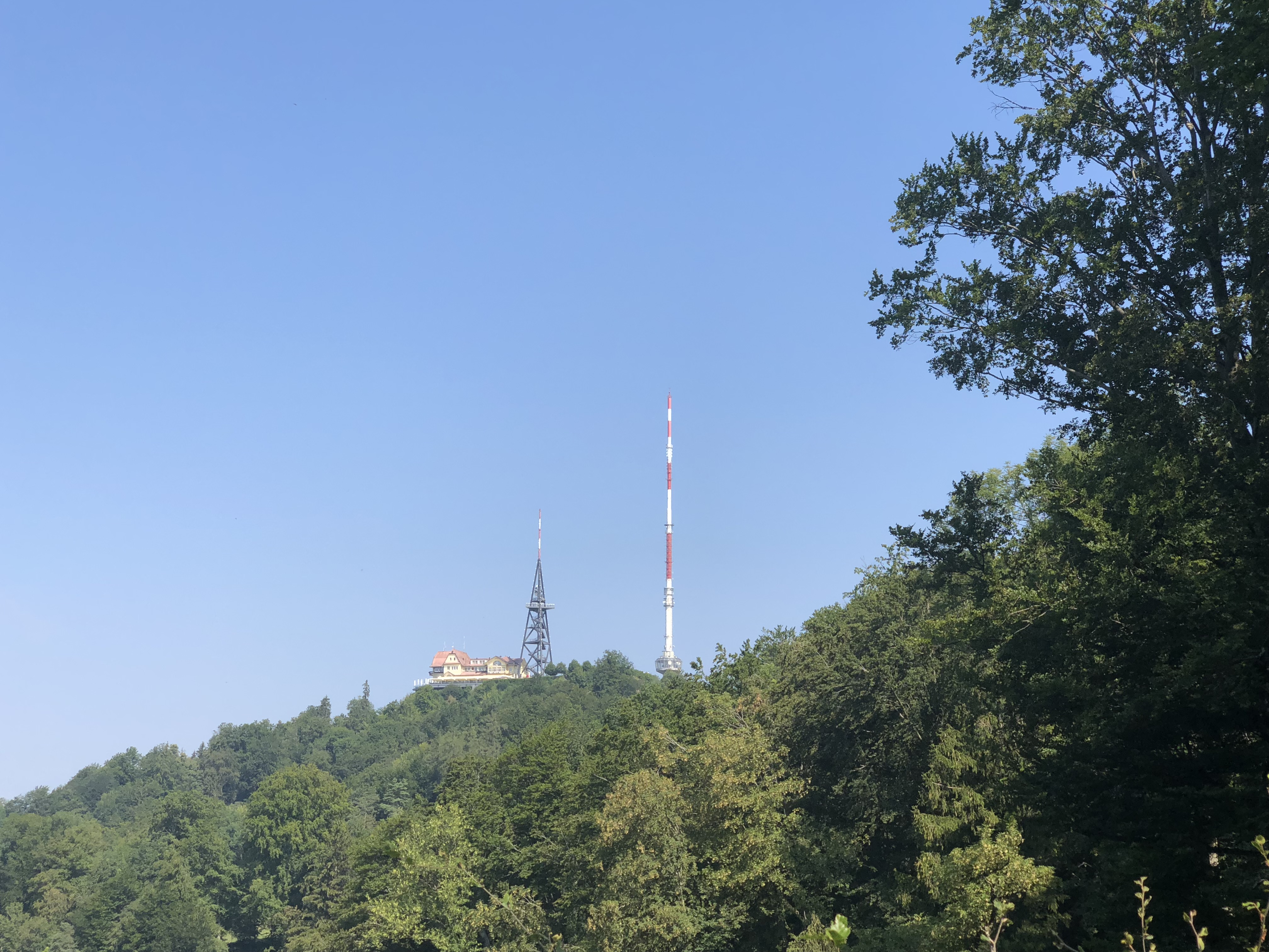 Restaurant Felsenegg